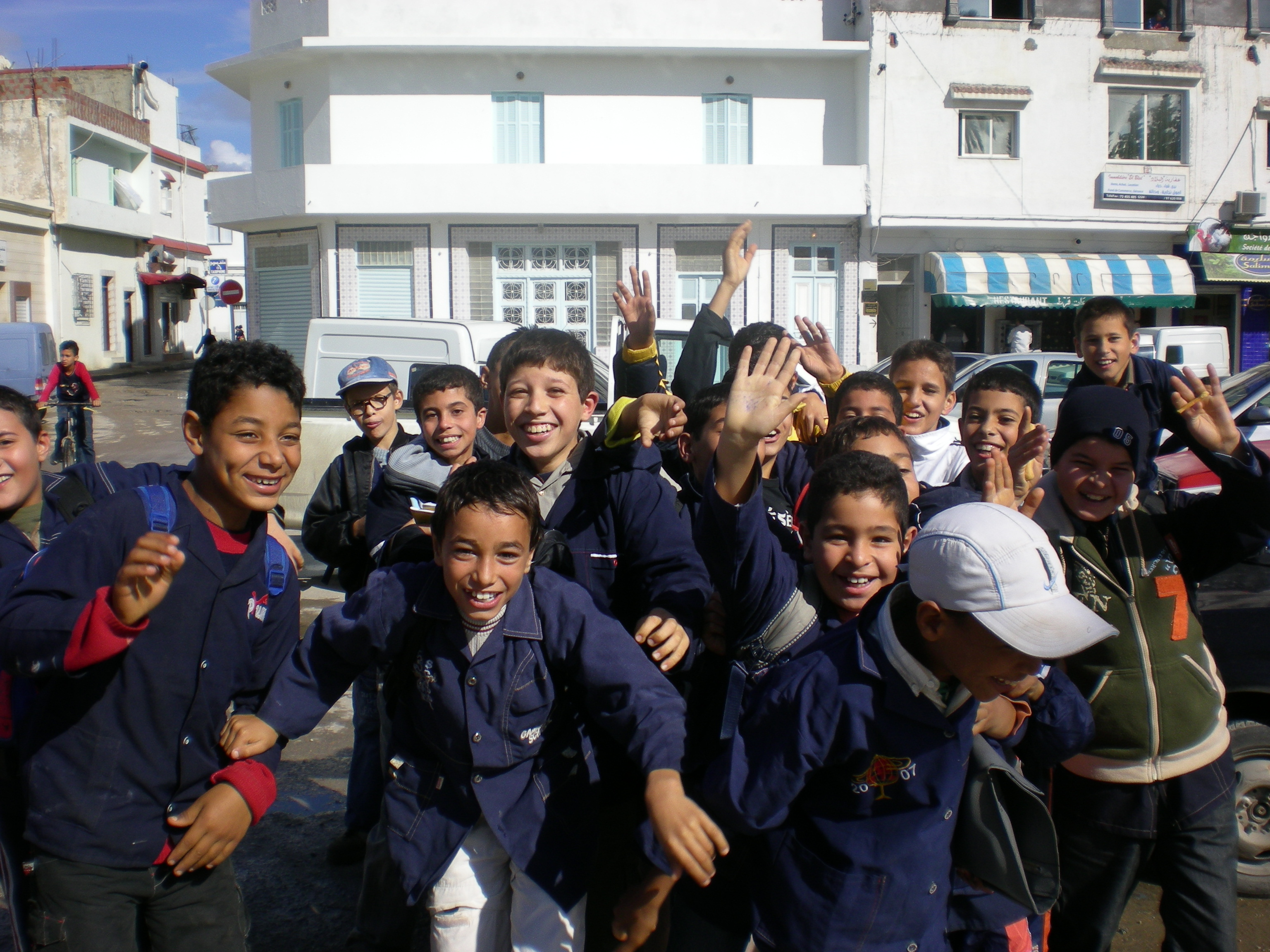 Ecoliers en sortie de classe à Ras Jebel